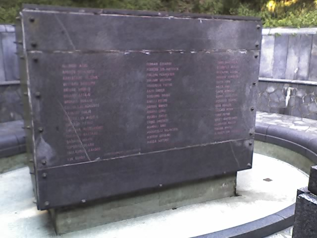 autore della foto: Fioravante Patrone cippo commemorativo della strage del Turchino